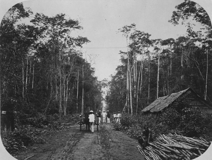 Foto. Plantage Klambir Lima in Deli, de weg voor de administrateurswoning